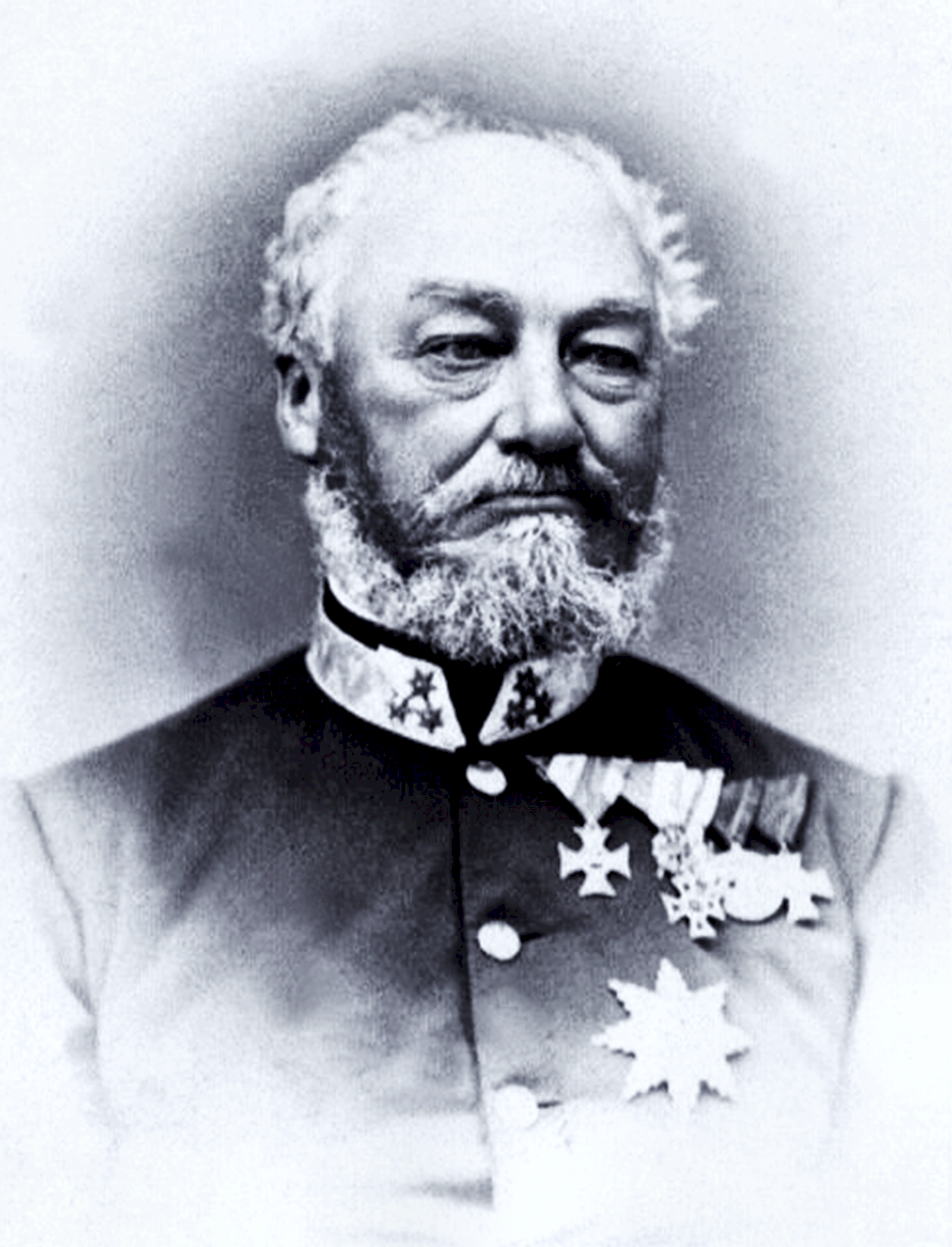 Ernst Ritter von Hartung als FZM nach 1869